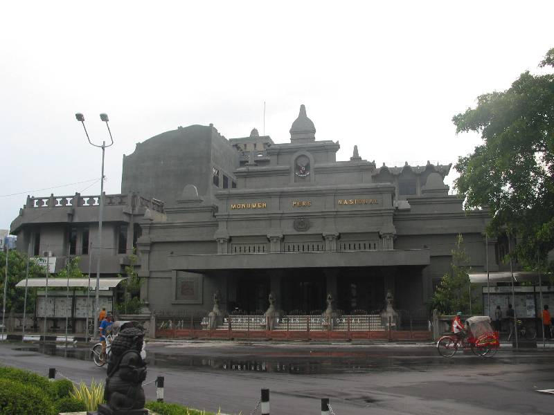 Museum Pers (Indonesian Press Museum)